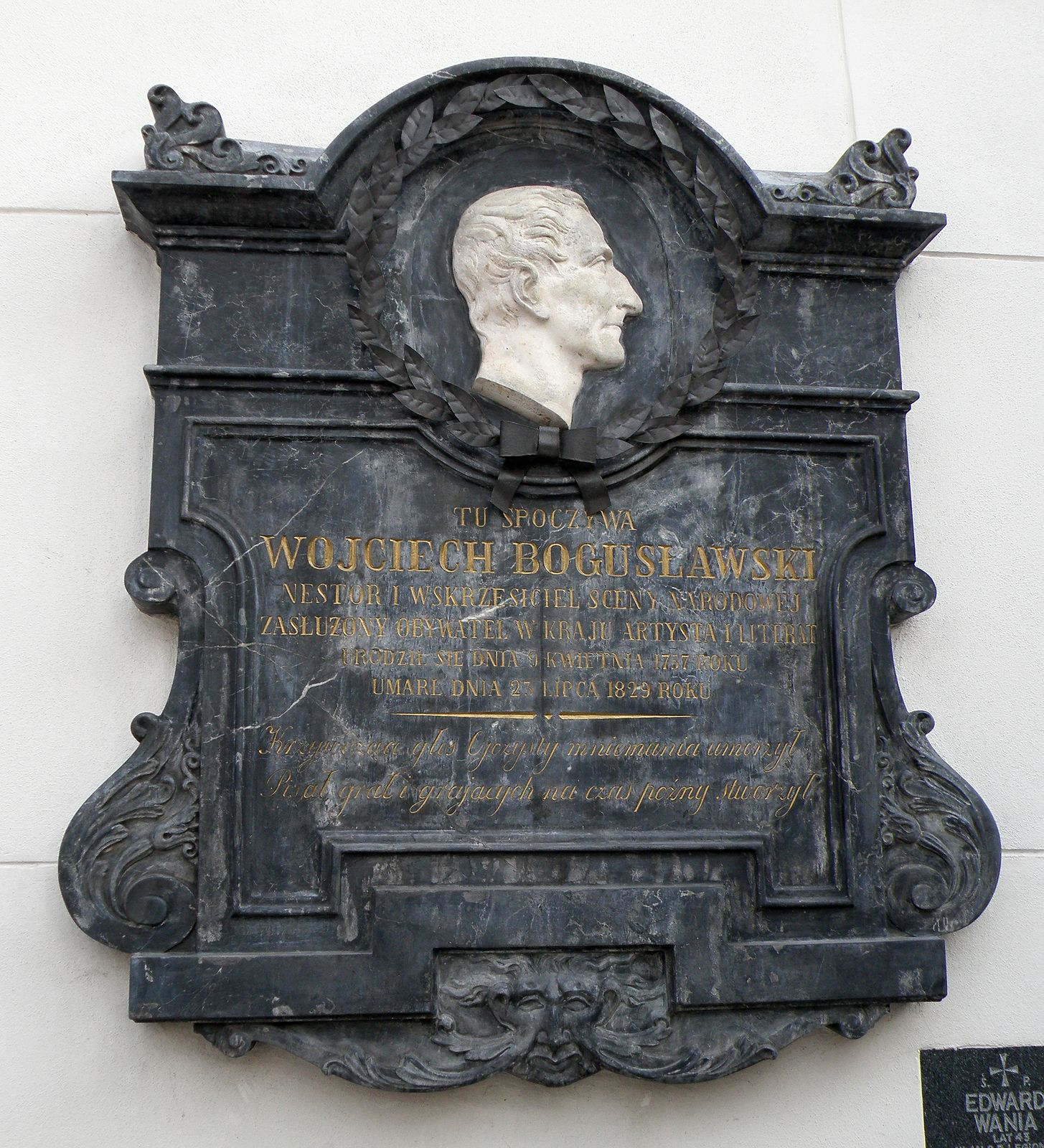 Wojciech Bogusławski, cmentarz na Powązkach